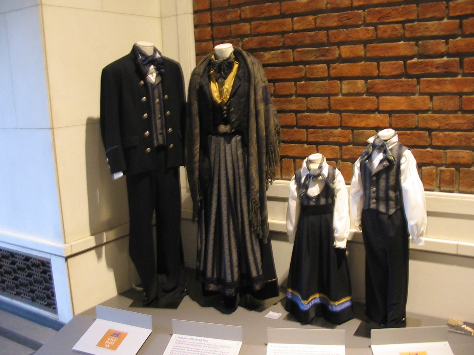 Costumes ayant servi à la célébration du jubilée d'Oslo (Norvège). Je suis l'auteur du cliché pris en juillet 2004